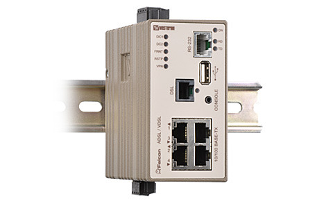 FalconWestermo